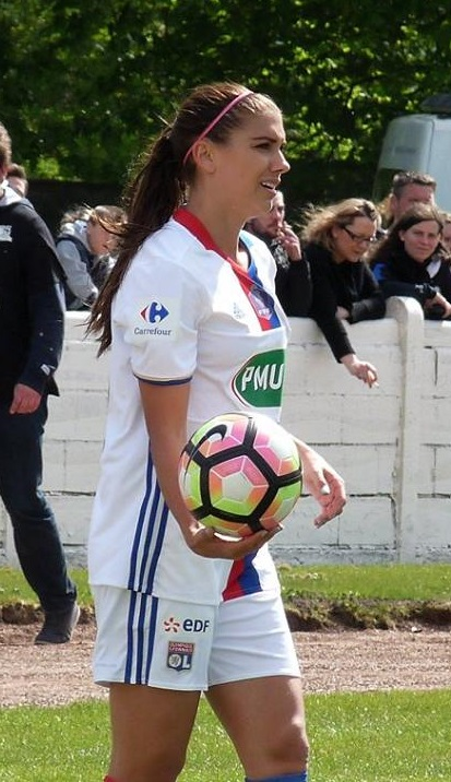 Alex Morgan en demi-finale de Coupe de France face à Henin-Beaumont le 16 avril 2017.